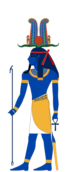 Tatenen (também chamado de Ta-tenen, Tatjenen, Tathenen, Tanen, Tenen, Tanenu e Tanuu ) era o deus do monte primordial na antiga religião egípcia. Seu nome significa terra ressuscitada ou terra exaltada, bem como se referindo ao lodo do Nilo.